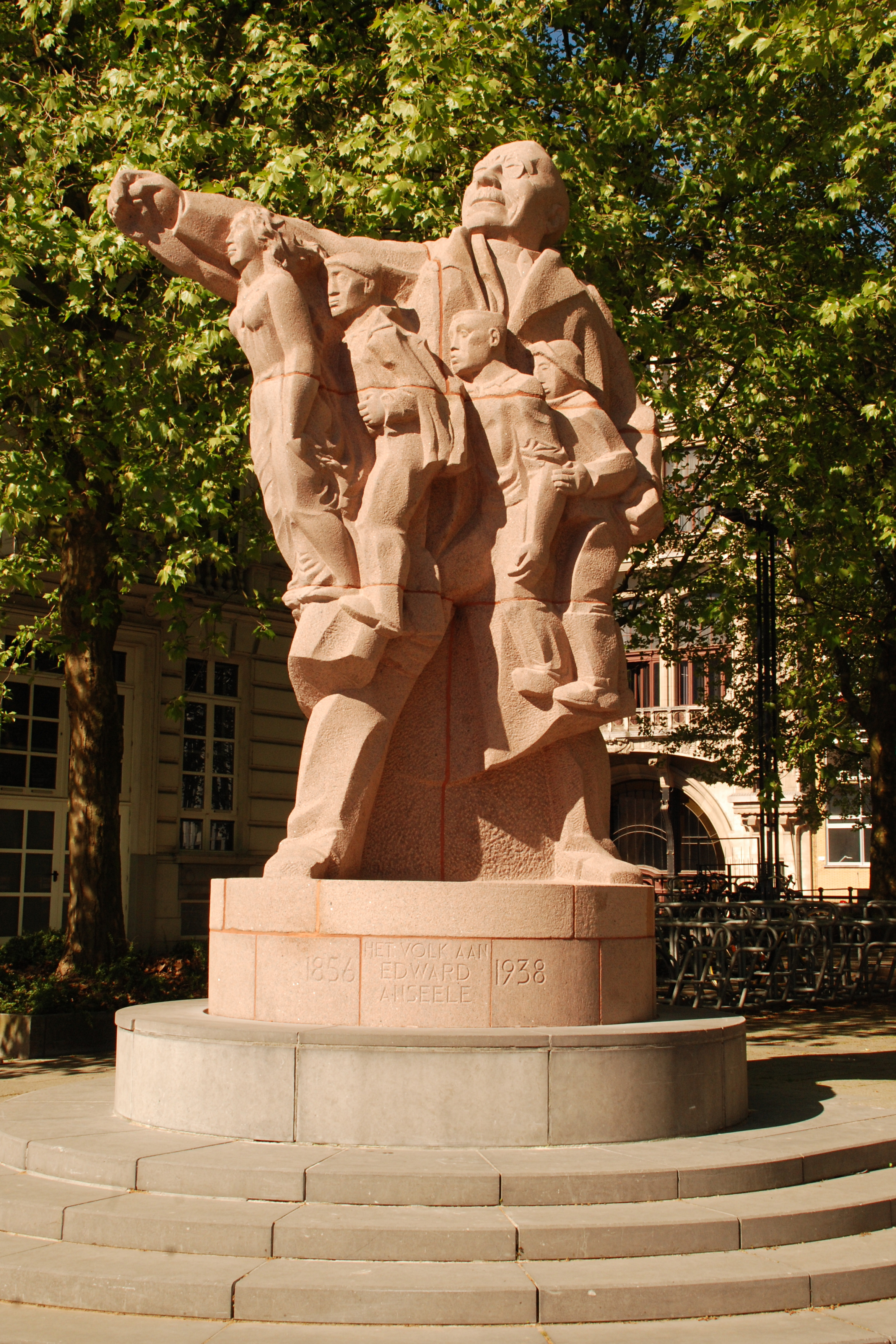 Belgique - Gand - place de France (Frankrijkplein) - Monument Anseele This photo of immovable heritage has been taken in the Flemish Region